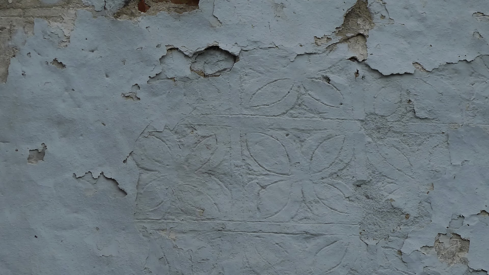 Zbytky sgrafito na fasádě bývalé tvrze z renesančního období